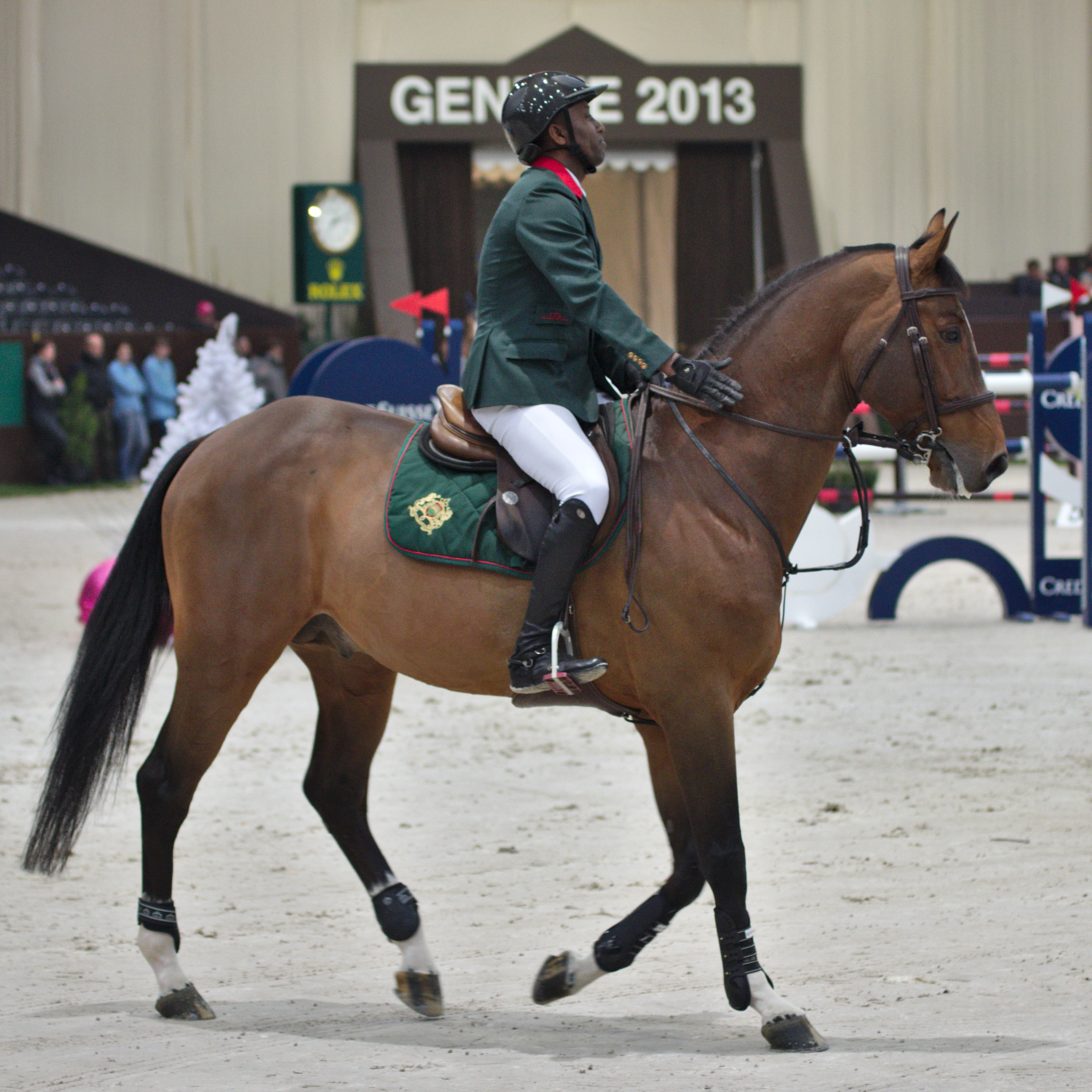 CHI Genève 2013 - 20131212 - Abdelkebir Ouaddar et Quickly de Kerisker